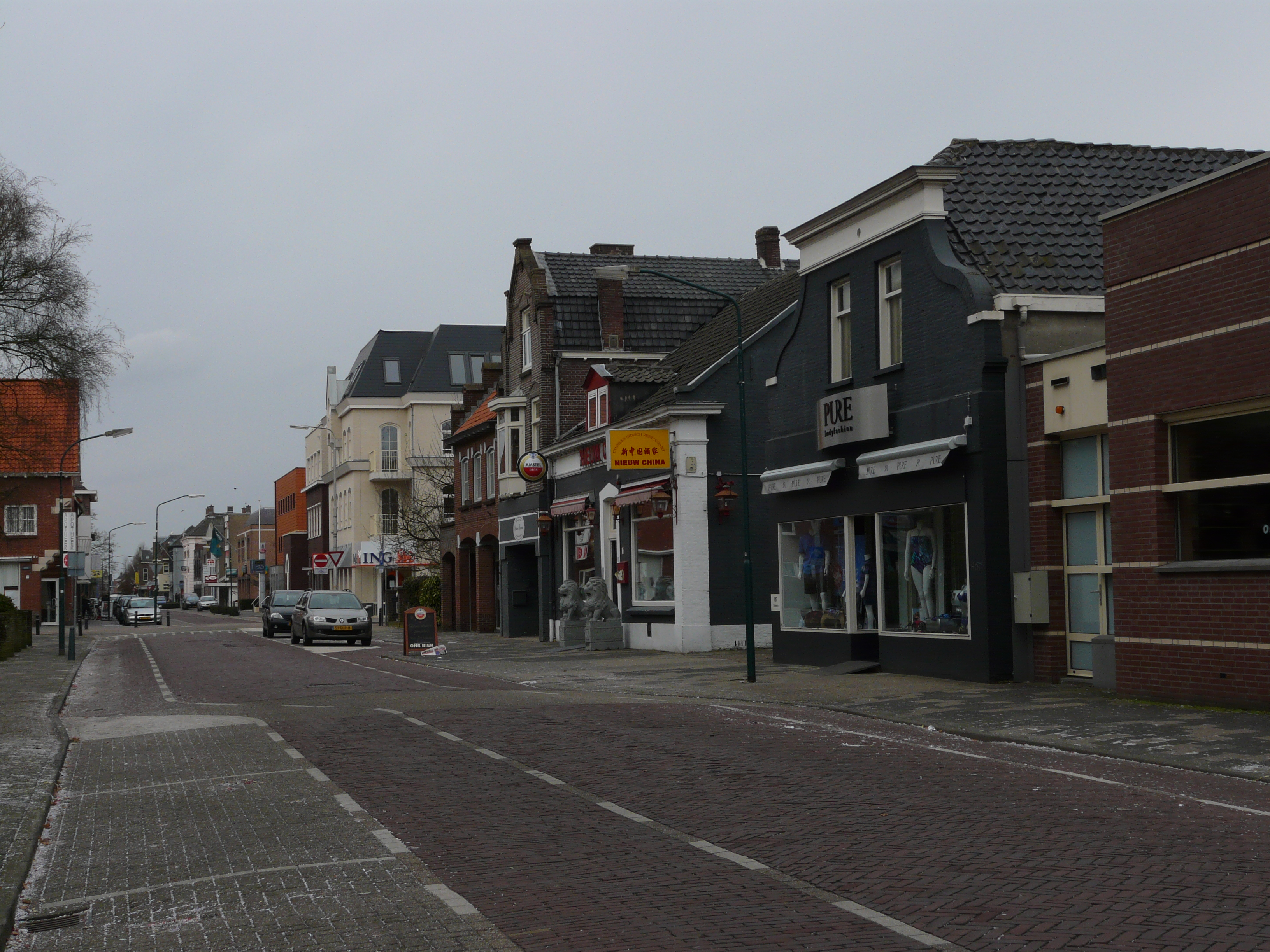 Straat in Dongen